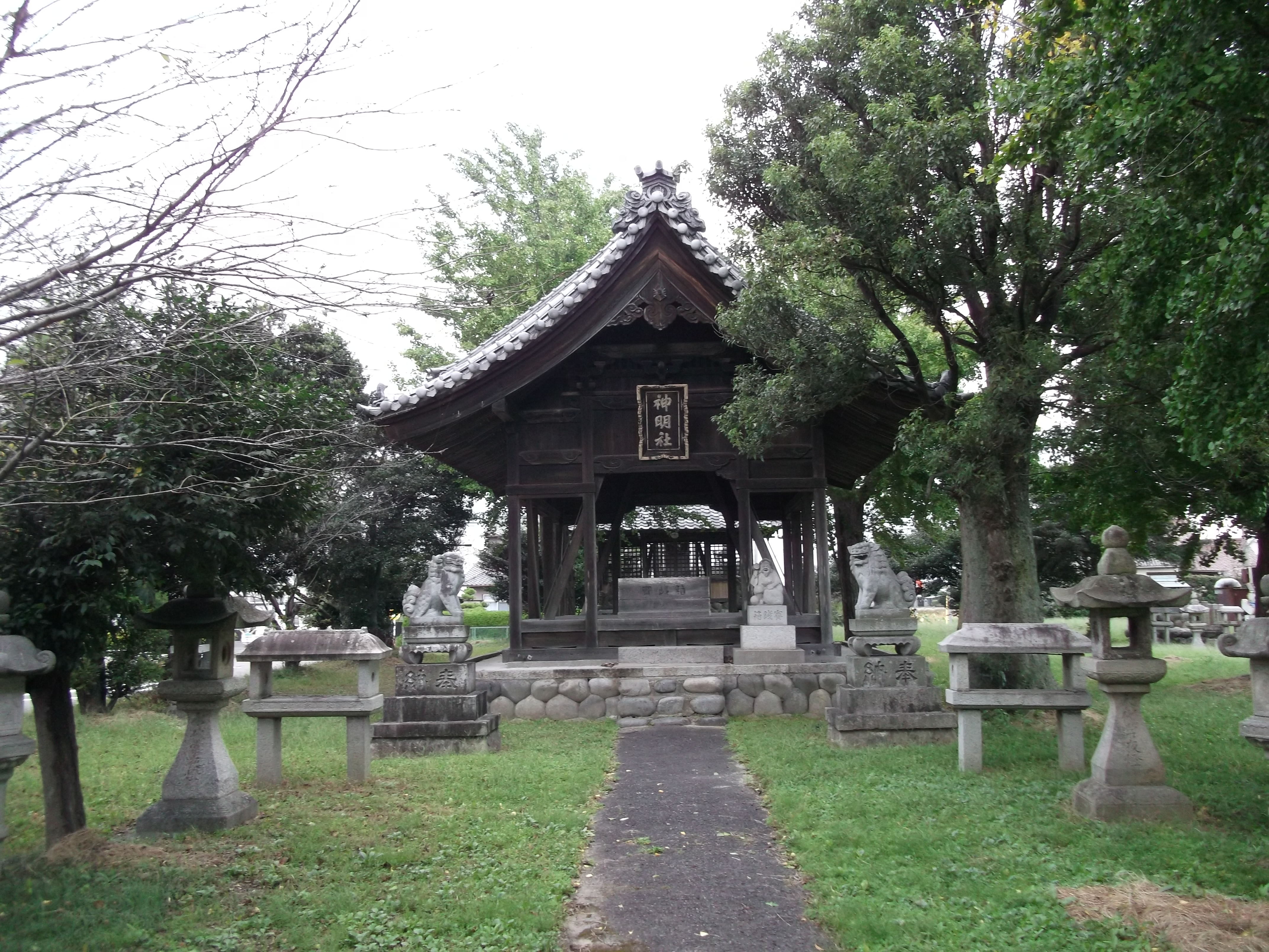 愛西市江西町に鎮座する神明社本殿